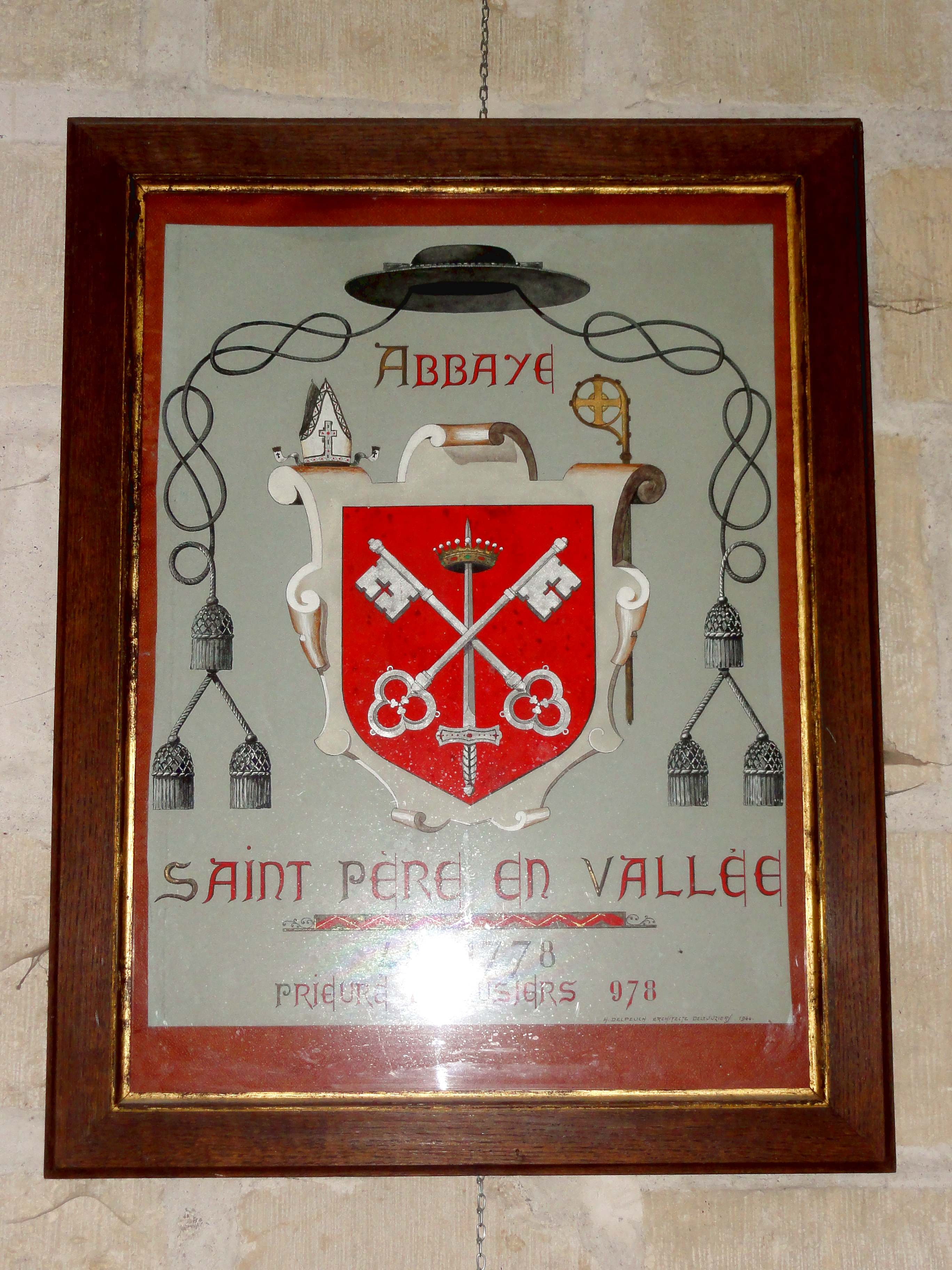 Mobilier de l'église - voir titre.